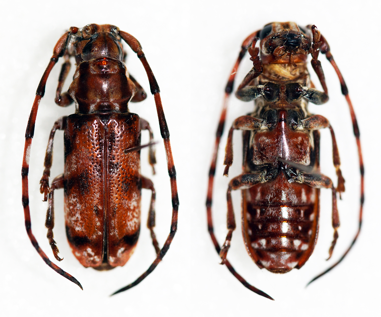 Sex: Male Data: 10-2013 - Mt Kloto - Togo Size: 14mm